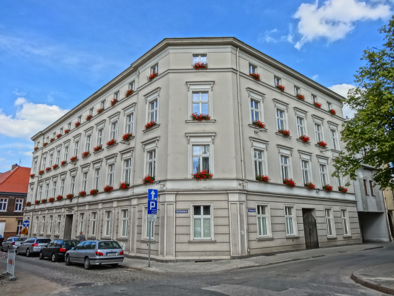 Wojewódzki Sąd Administracyjny w Bydgoszczy. Ulica Pod Blankami